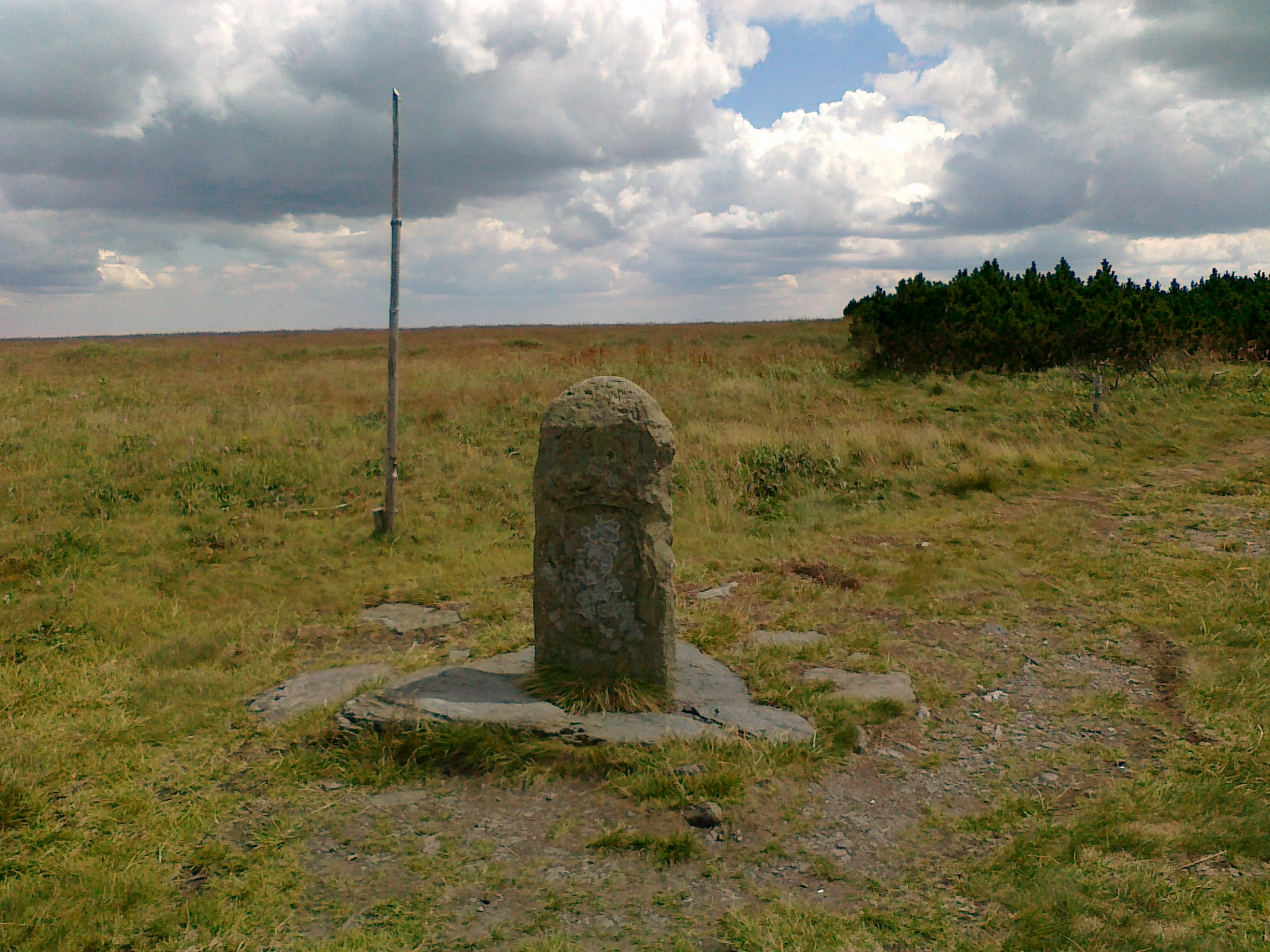 Kamień graniczny na połaci szczytowej góry Vysoká hole